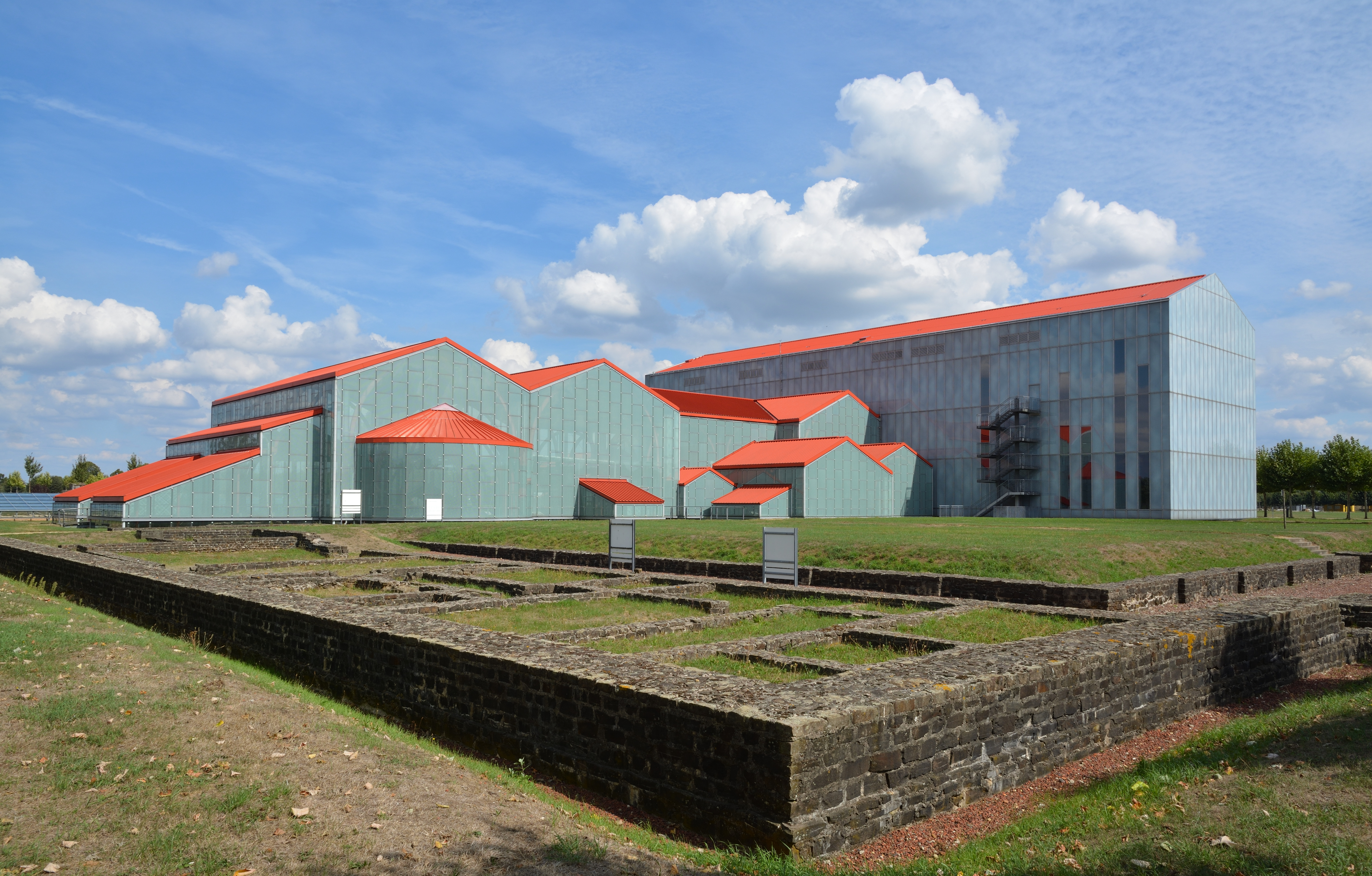 Impressionen aus dem LVR-Archäologischer Park Xanten Hier: Bilder aus der Insula 10, der Thermeninsula.